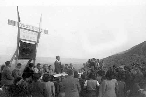 Historical images of Givat Nesher תמונות היסטוריות של גבעת נשר Givat Nesher putting the cornerstone December 13, 1948 טקס הנחת אבן הפינה של שכונת גבעת נשר בתאריך 13 בדצמבר 1948